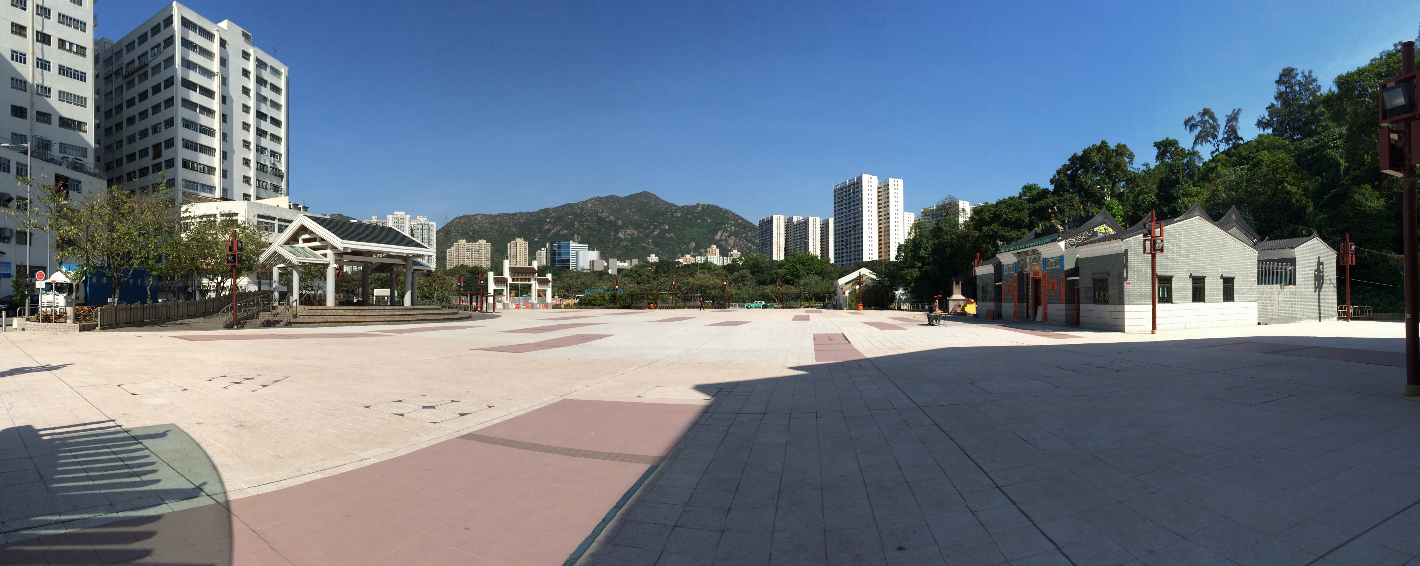 Tuen Mun Tin Hau Temple Square Pano